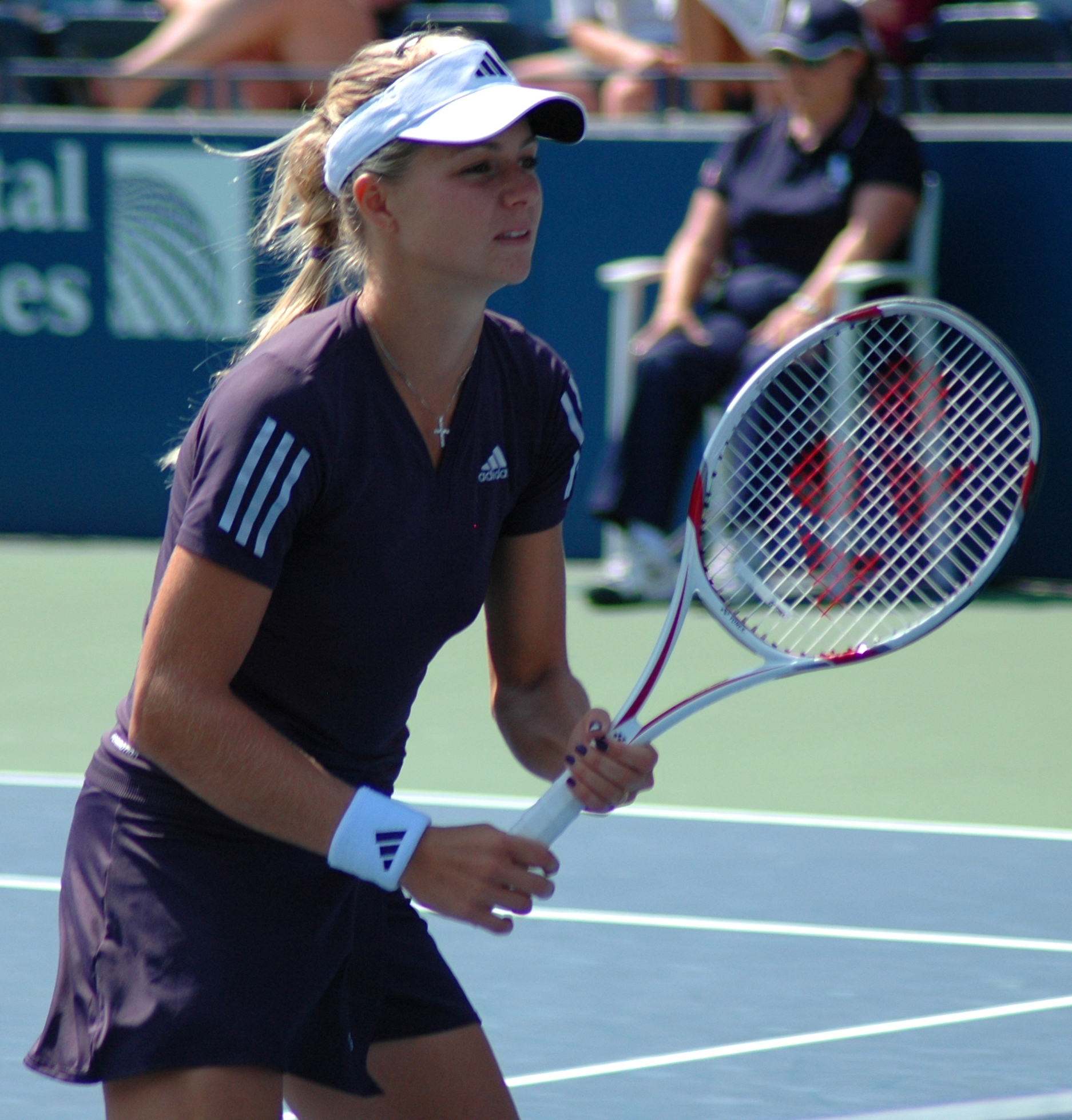 Maria Kirilenko US Open 2009